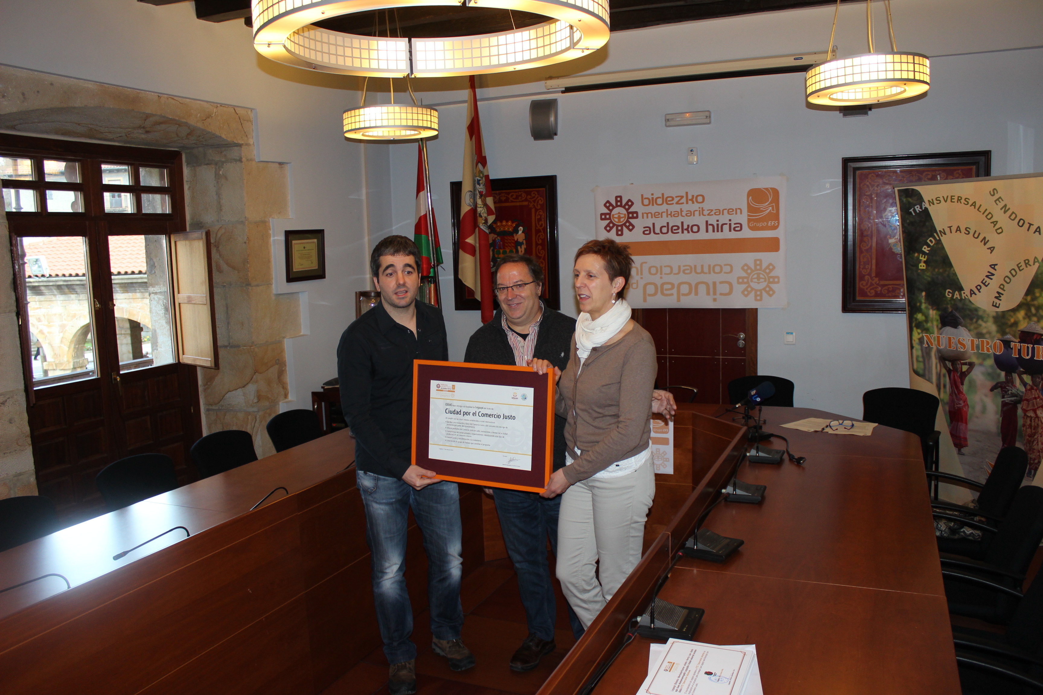 Bidezko merkataritzaren aldeko hiriak Legazpi